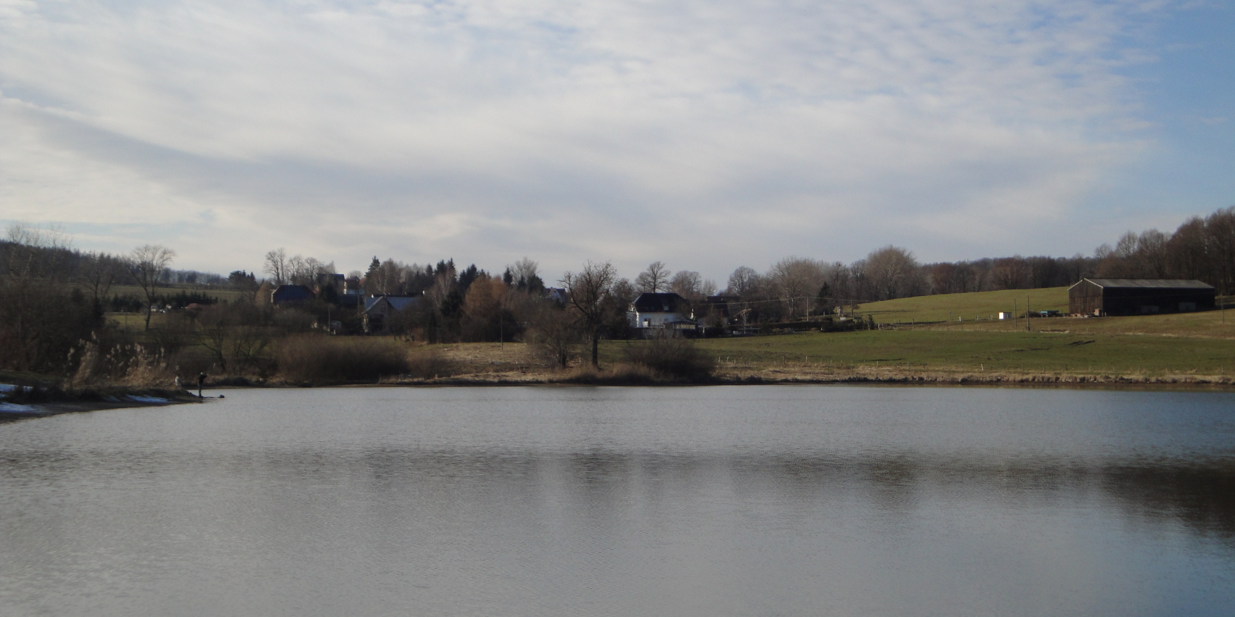 Blick über die Talsperre Rachlau auf Döhlen, Gemeinde Kubschütz, Landkreis Bautzen. Hornjoserbsce: Wid přez Rachlowsku rěčnu zawěru do Delan, gmejna Kubšicy, wokrjes Budyšin.